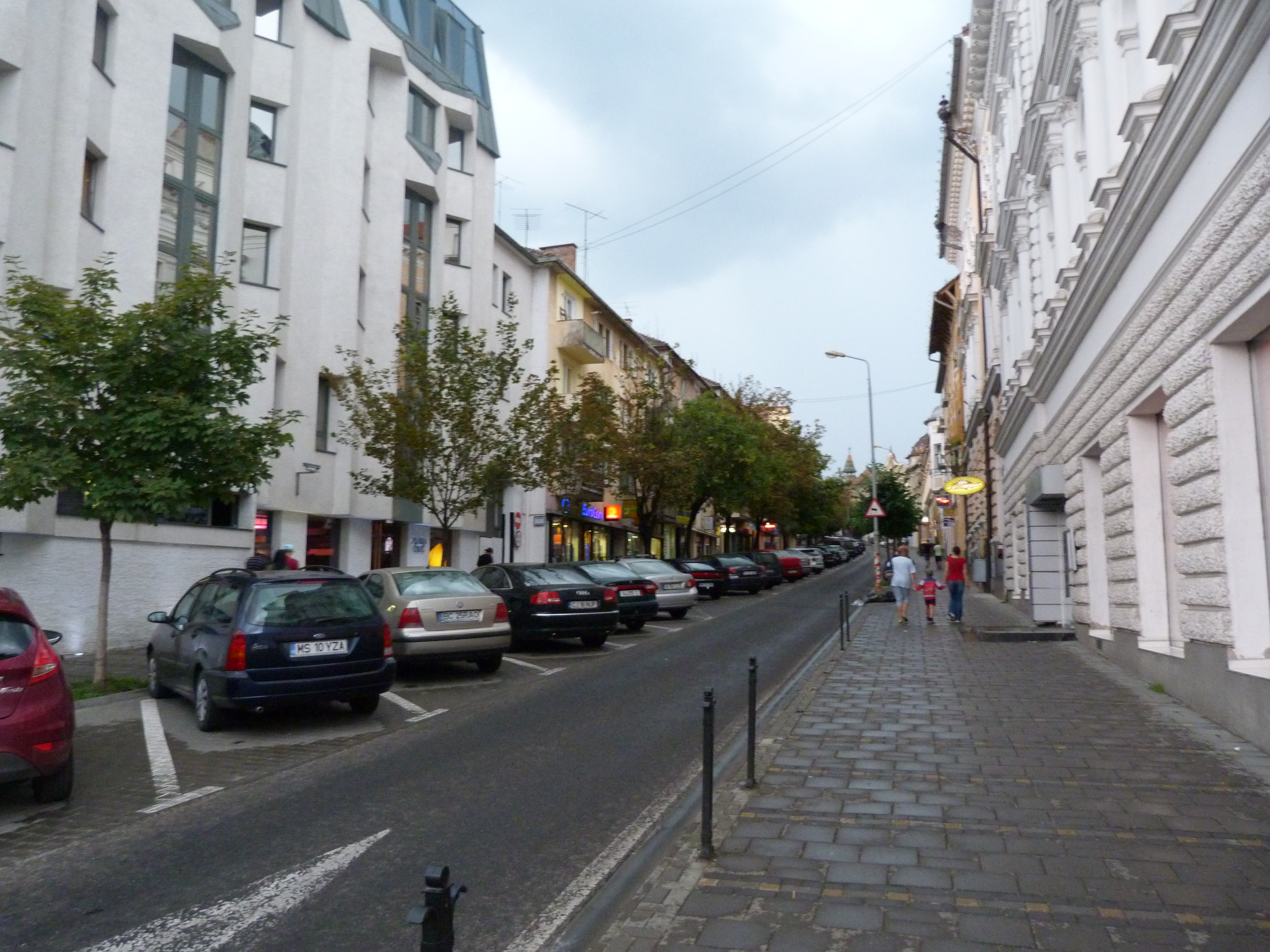 A felvétel 2013. július 11 -én csütörtökön készült Marosvásárhelyen. ©© Published under Creative Commons in the Metapolisz DVD line. All of the photos and vids in the Metapolisz DVD line are under Creative Commons and can be used even for commercial – for profit – purposes. Recommended Citation Derzsi Elekes Andor: Metapolisz DVD line